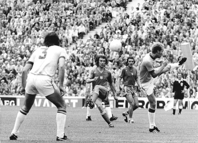 ADN-ZB-Mittelstädt-16.7.74-wen-München: X. Fußball-Weltmeisterschaft- Spiel um den dritten Platz VR Polen gegen Brasilien 1:0 am 6.7.74. Von links: Marinho (Brasilien), Adam Musial, Henryk Kasperczak (beide Polen) und Ademir (Brasilien).